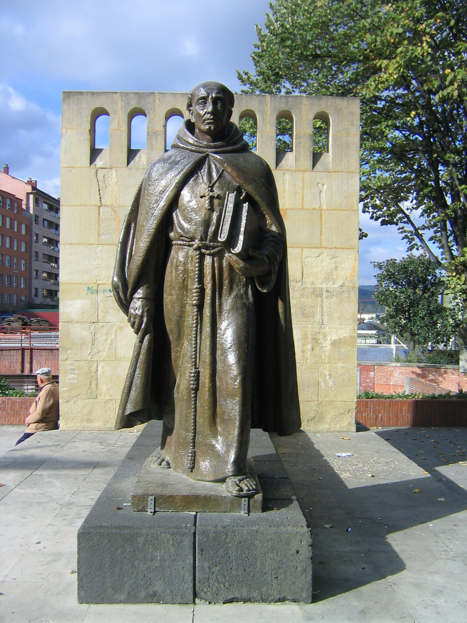 Monumento a Frai Juan de Zumárraga, primer obispo de México en Durango, Vizcaya, País Vaco, España.